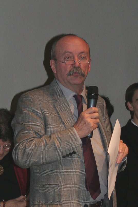 Jacques Legrand , INALCO (Paris) Président (at International asian movies festival in Vesoul)